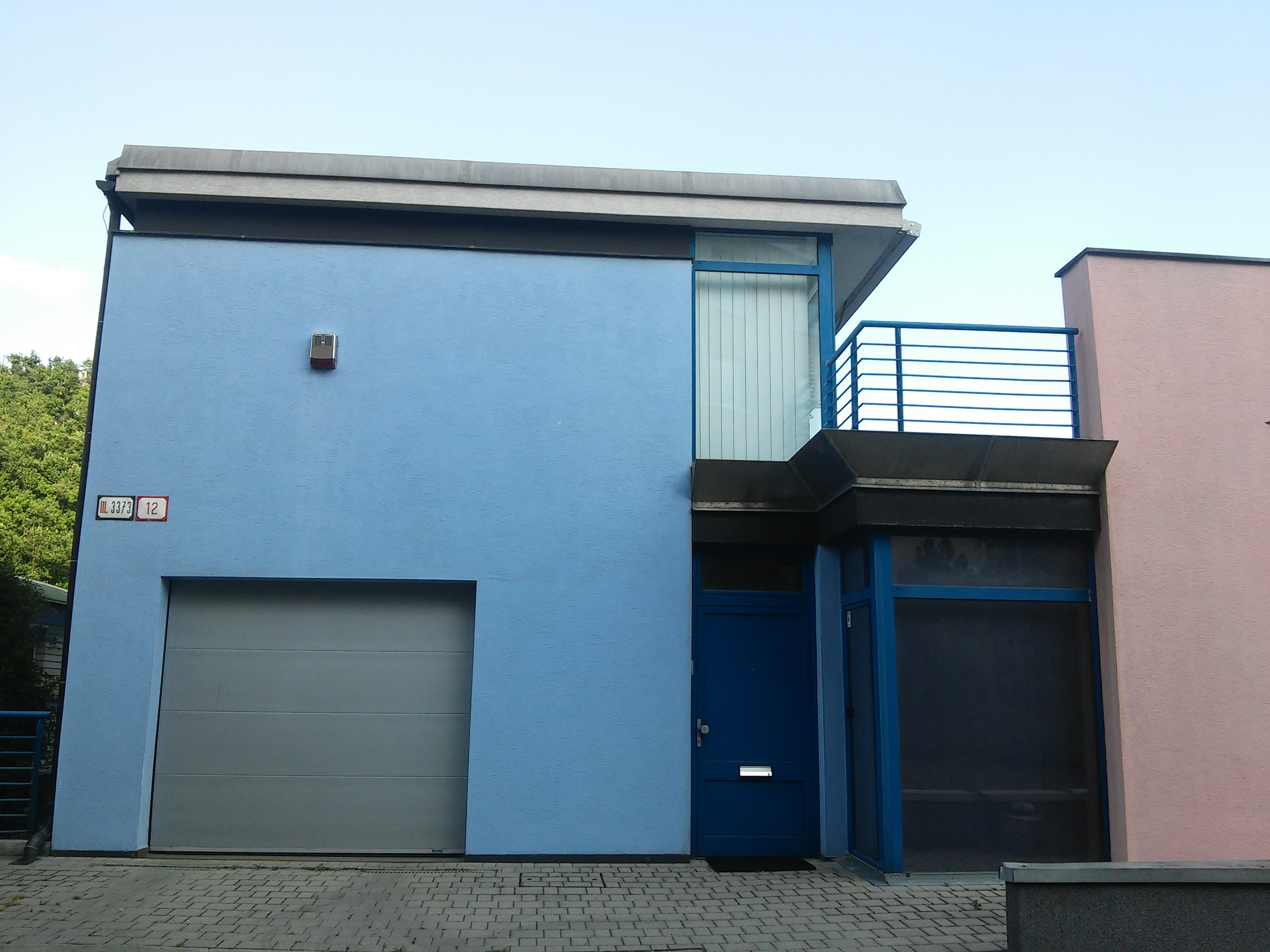 Guothova, Nové Mesto, Bratislava